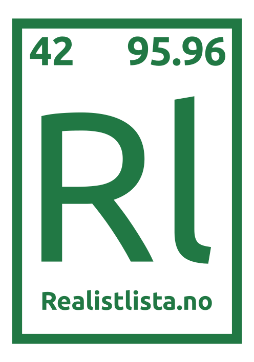 Logoen til Realistlista